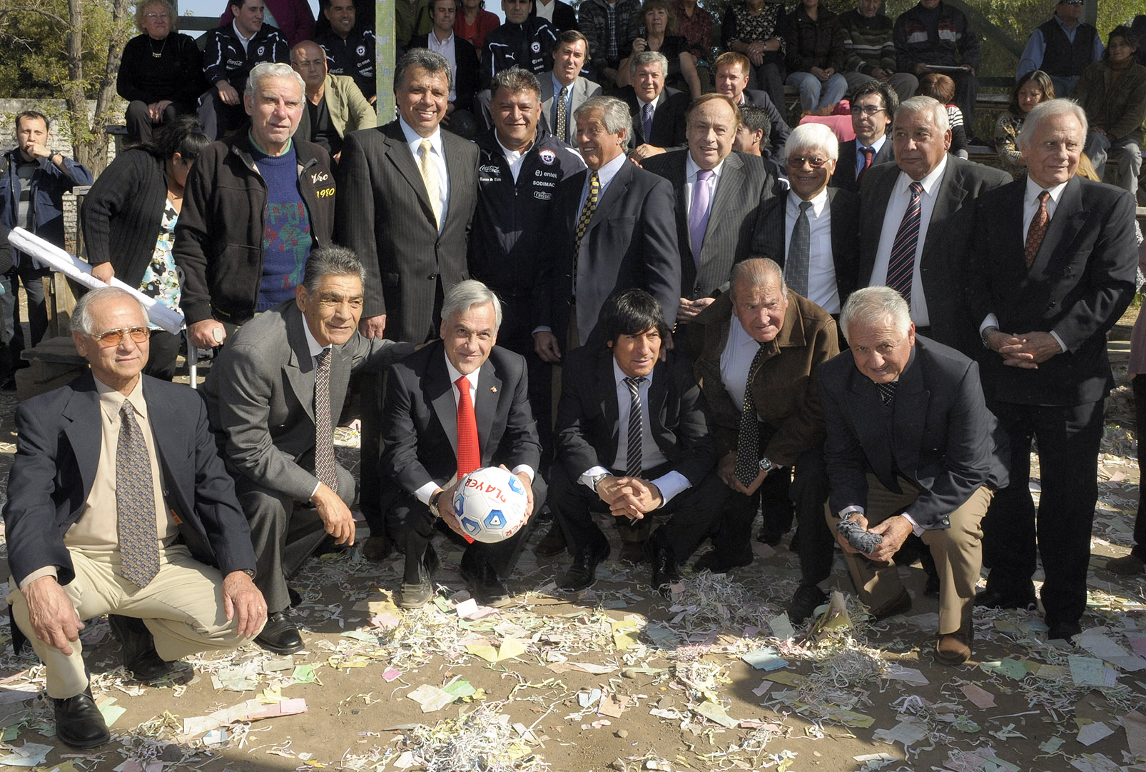 02-05-2011 Plan de infraestructura para el fútbol nacional chileno.